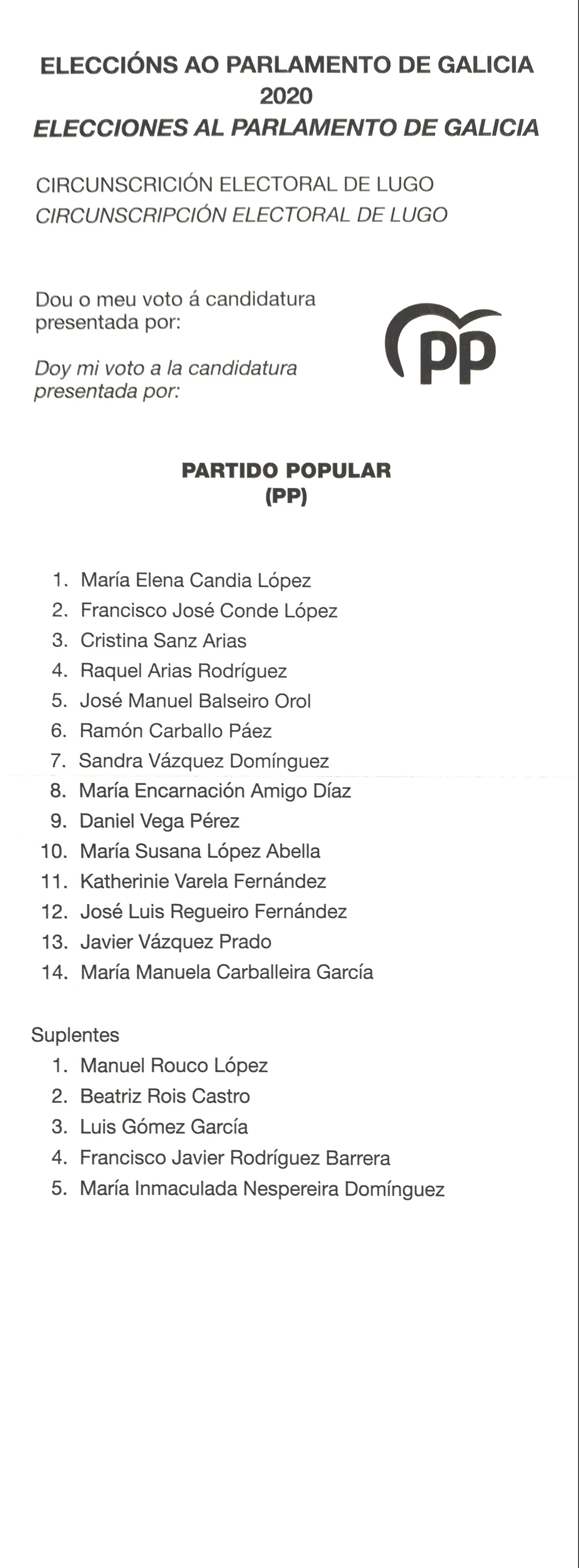 Papeletas electorais Eleccións ao Parlamento de Galicia 2020 pospostas circunscrición electoral de Lugo-PP